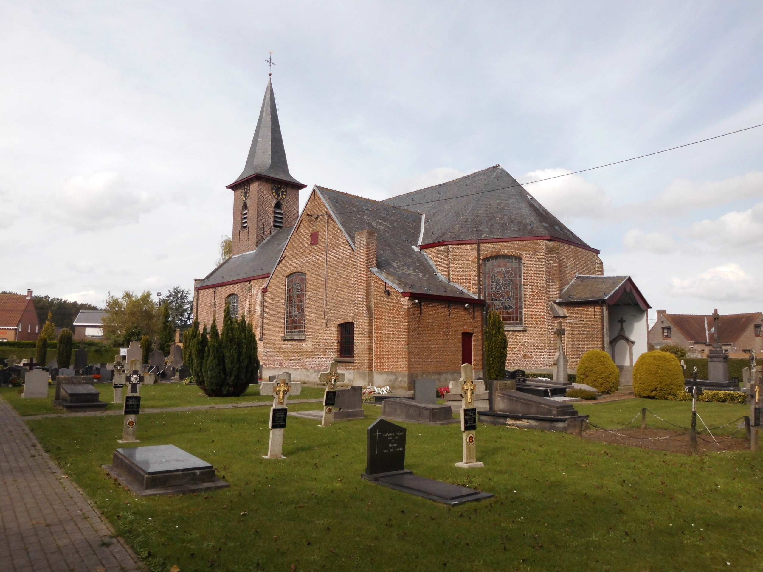 Achterkant van de Sint-Niklaaskerk - kant Appelstraat - Waterland-Oudeman - Sint-Laureins - Oost-Vlaanderen - België